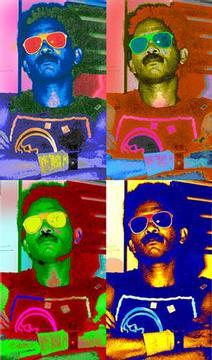 Fotografia original de Luis "El Terror" Días tomada por Laura Sklar entre 1982 y el 1987 en la República Dominicana... Manipulada digitalmente por Reynaldo García Pantaleón en el año 2001en la Ciudad de New York.